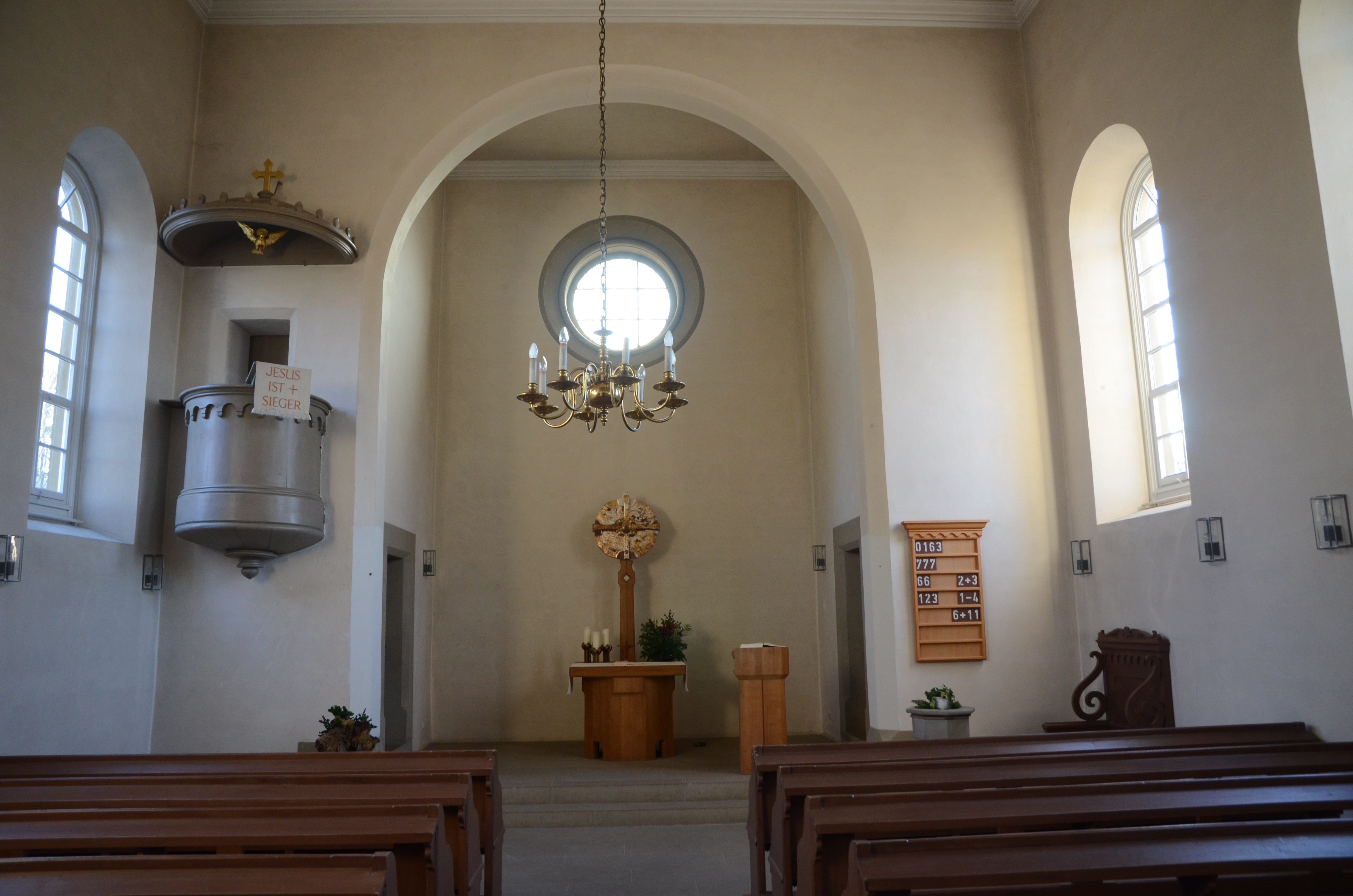 Evang.-Luth. Kirche in Madenhausen Innenraum